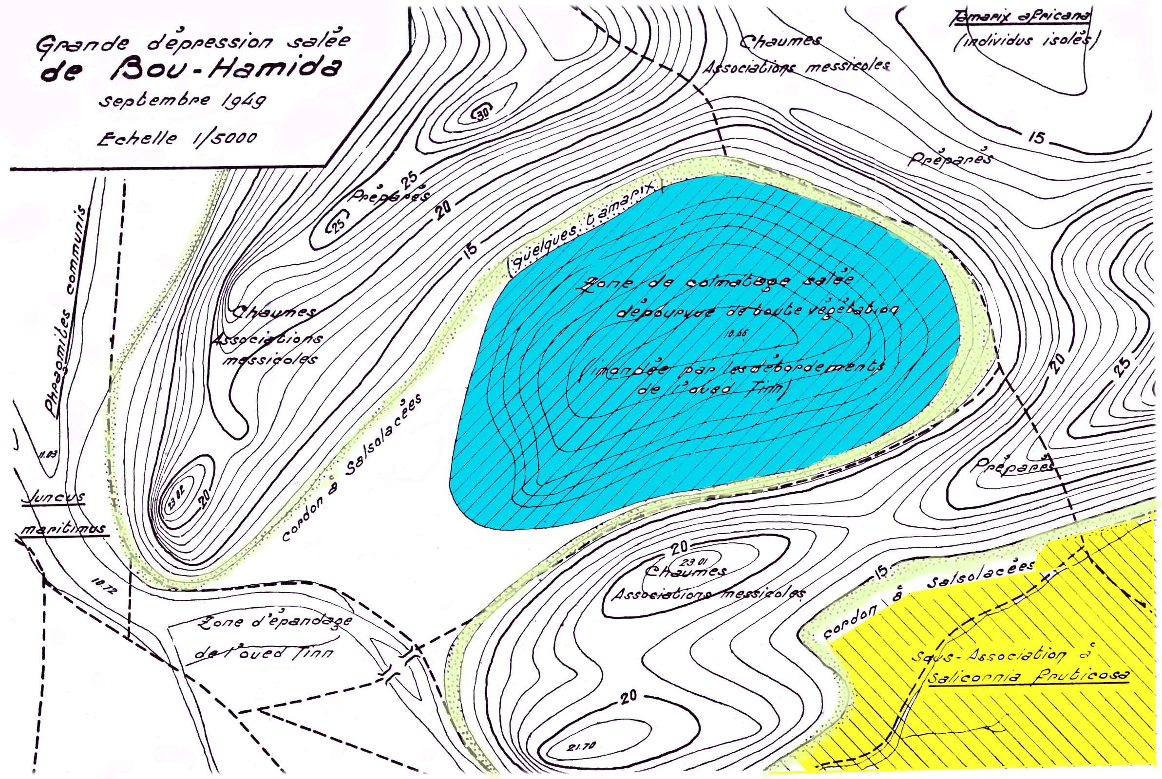 Représentation schématique de la zonation des groupements végétaux de la dépression salée de Bou-Hamida (Oranie, Algérie ; d'après Simoneau, 1952). Cette carte montre l'importance du microrelief pour la répartition de la végétation.